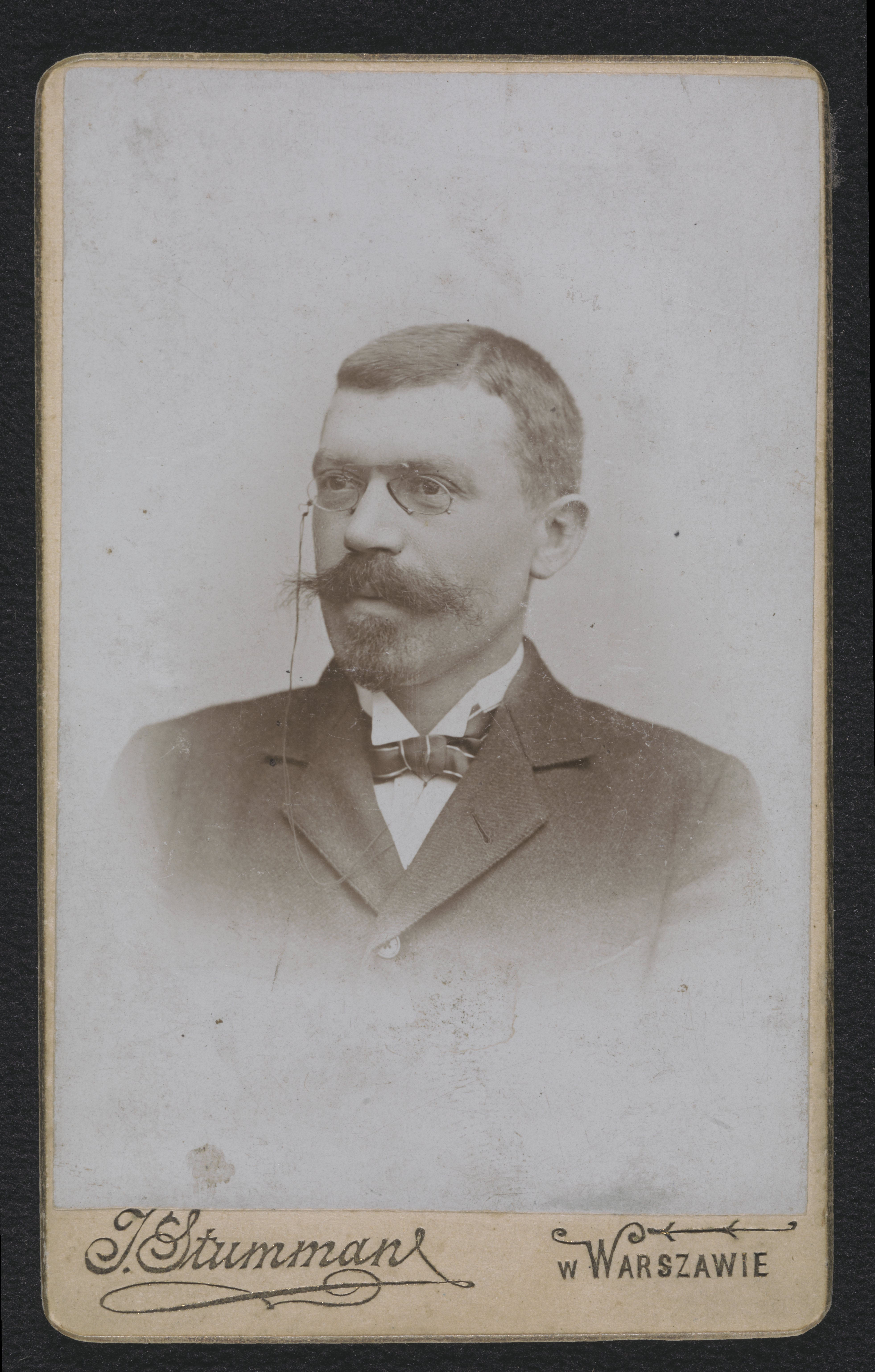 Edmund Biernacki, ok. 1905 r.